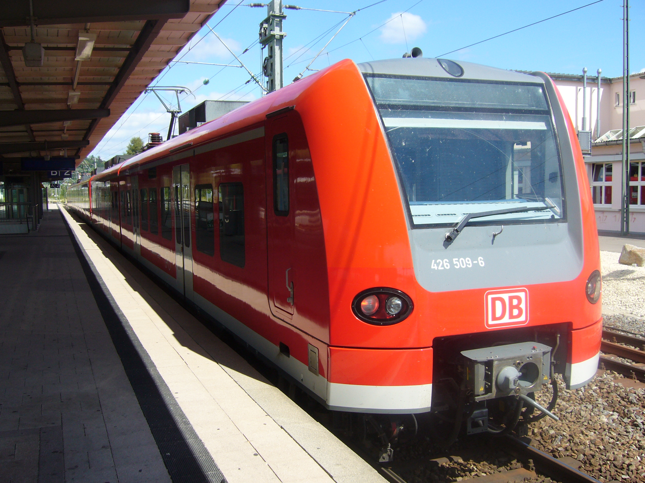 Regional-Express (Baureihe 425/426) im Bahnhof Tuttlingen